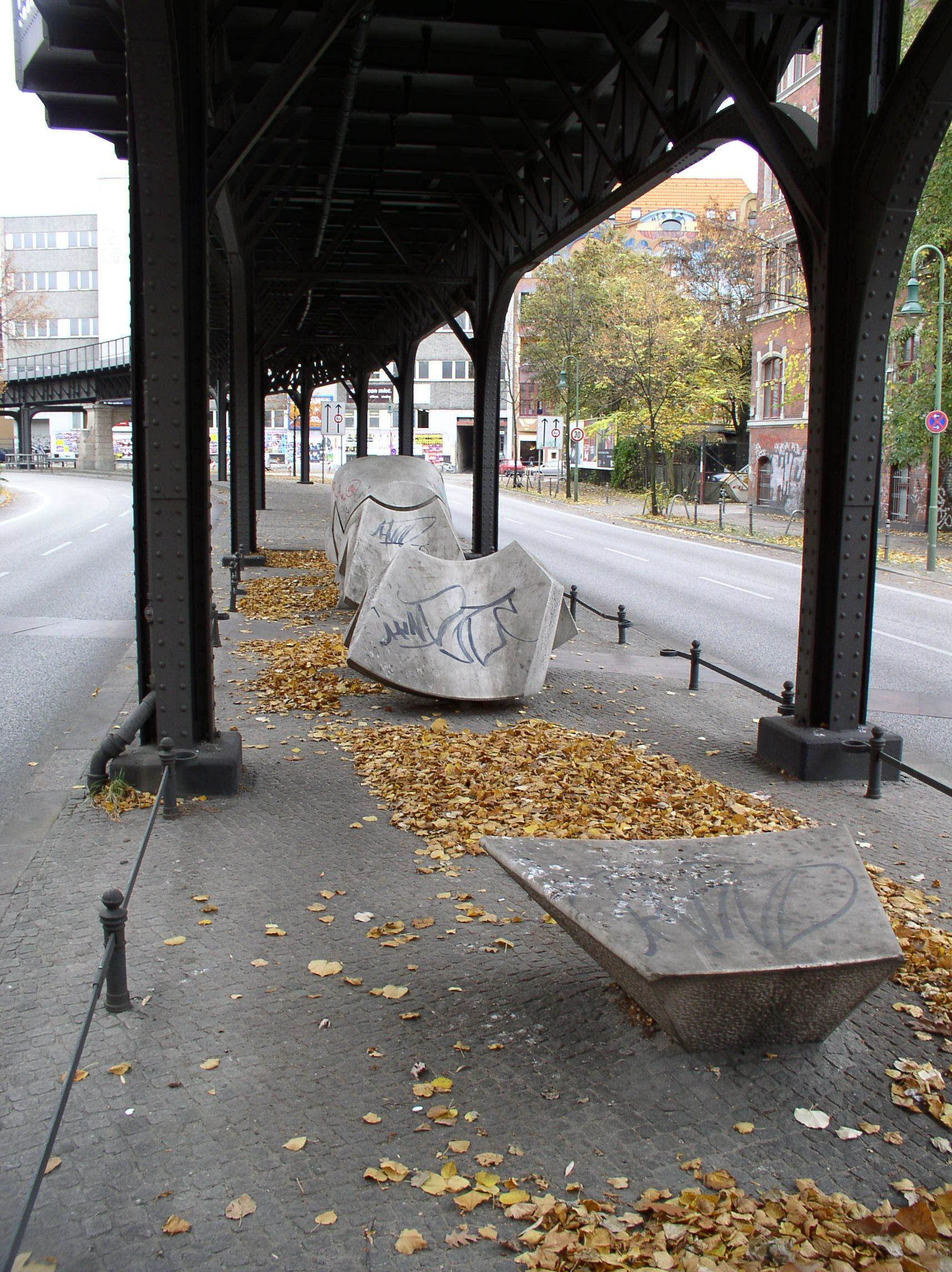 Puppenruhe (1987) von Louis Niebuhr, Teil der Menschenlandschaft Berlin.